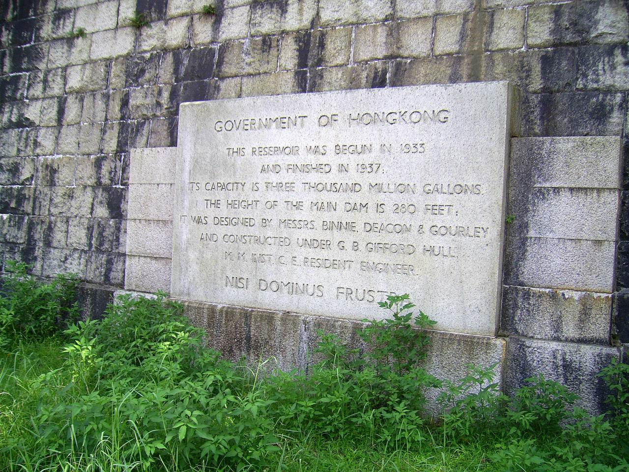 中文（香港）: 城門水塘紀念碑